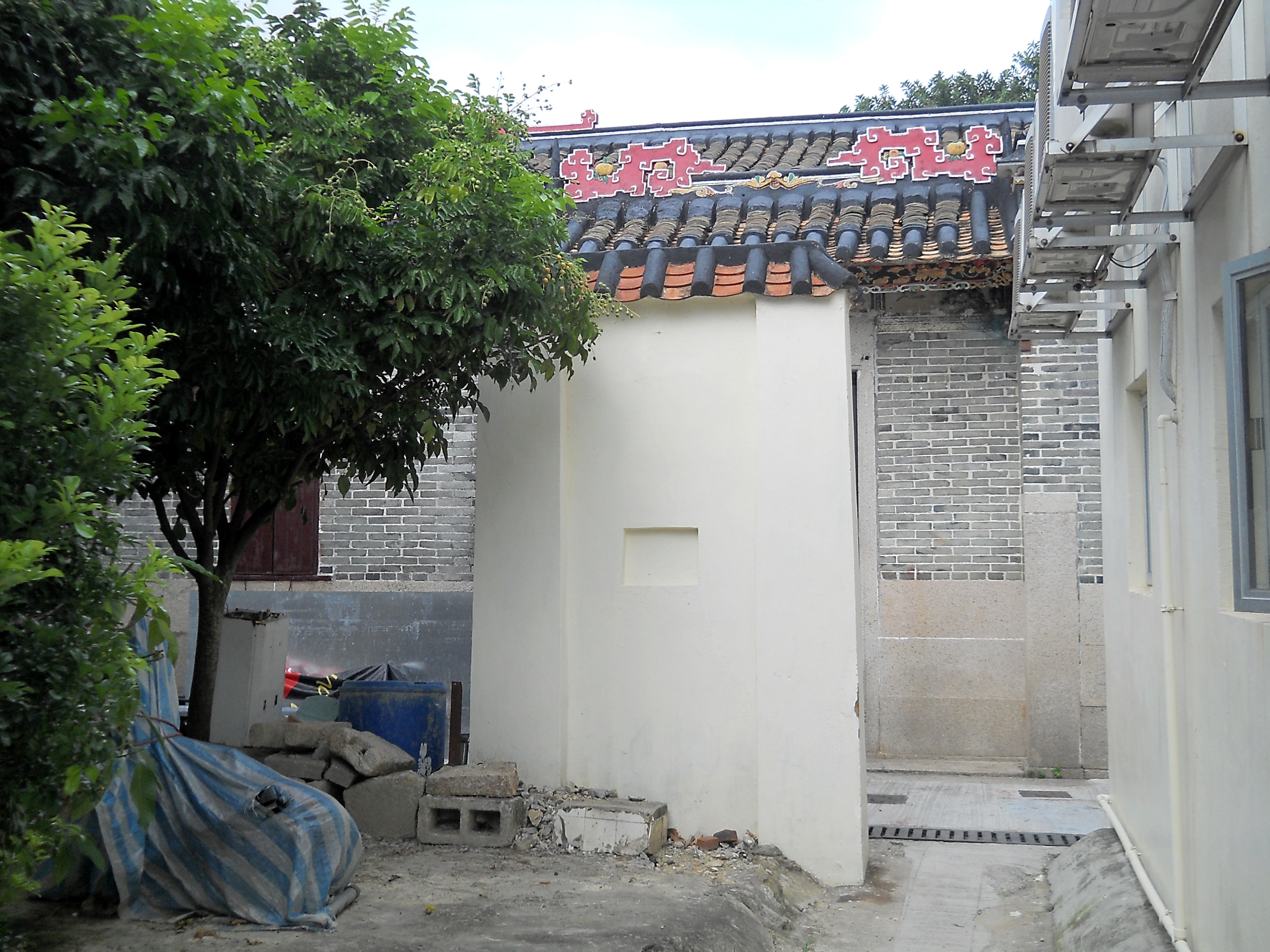 中文（香港）: 黃竹坑新圍舊民居前有影壁